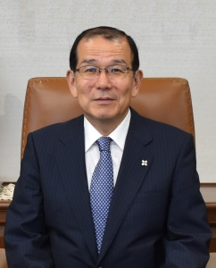 検察庁のホームページ上に掲載された肖像